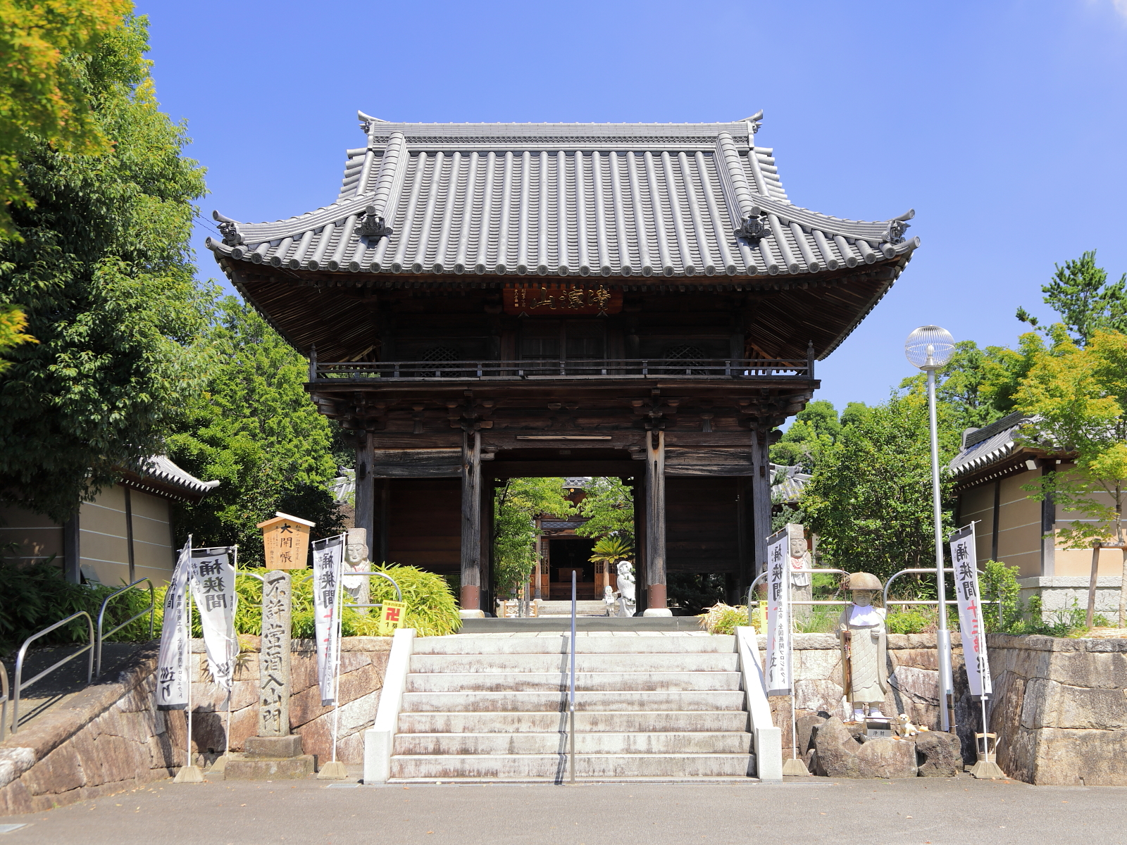 清涼山曹源寺山門（豊明市、2018年（平成30年）7月）